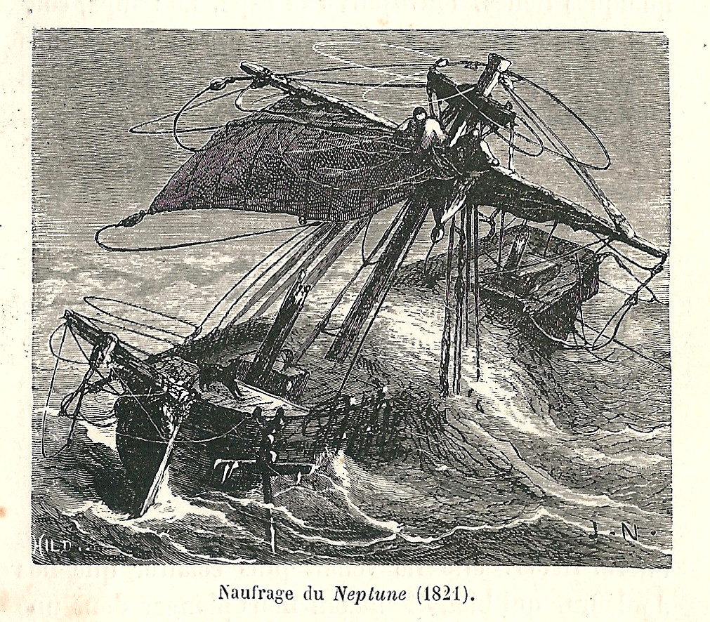 Gravure de Jules Noël tirée de : Zurcher & Margollé, Les Naufrages célèbres, Paris : Hachette, 3e édition, 1877